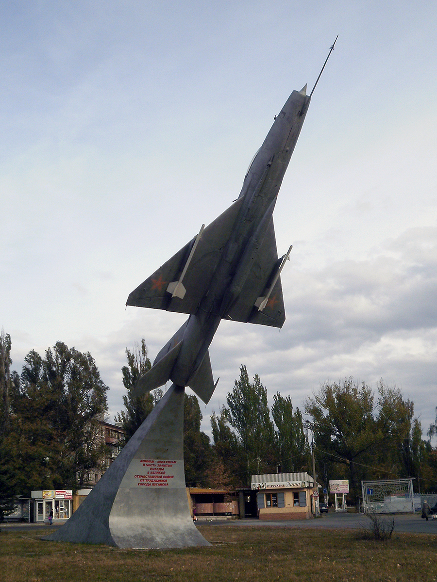 памятник выпускникам Луганского высшего военного авиационного училища штурманов им. Пролетариата Донбасса (ЛВВАУШ), установлен в 1975